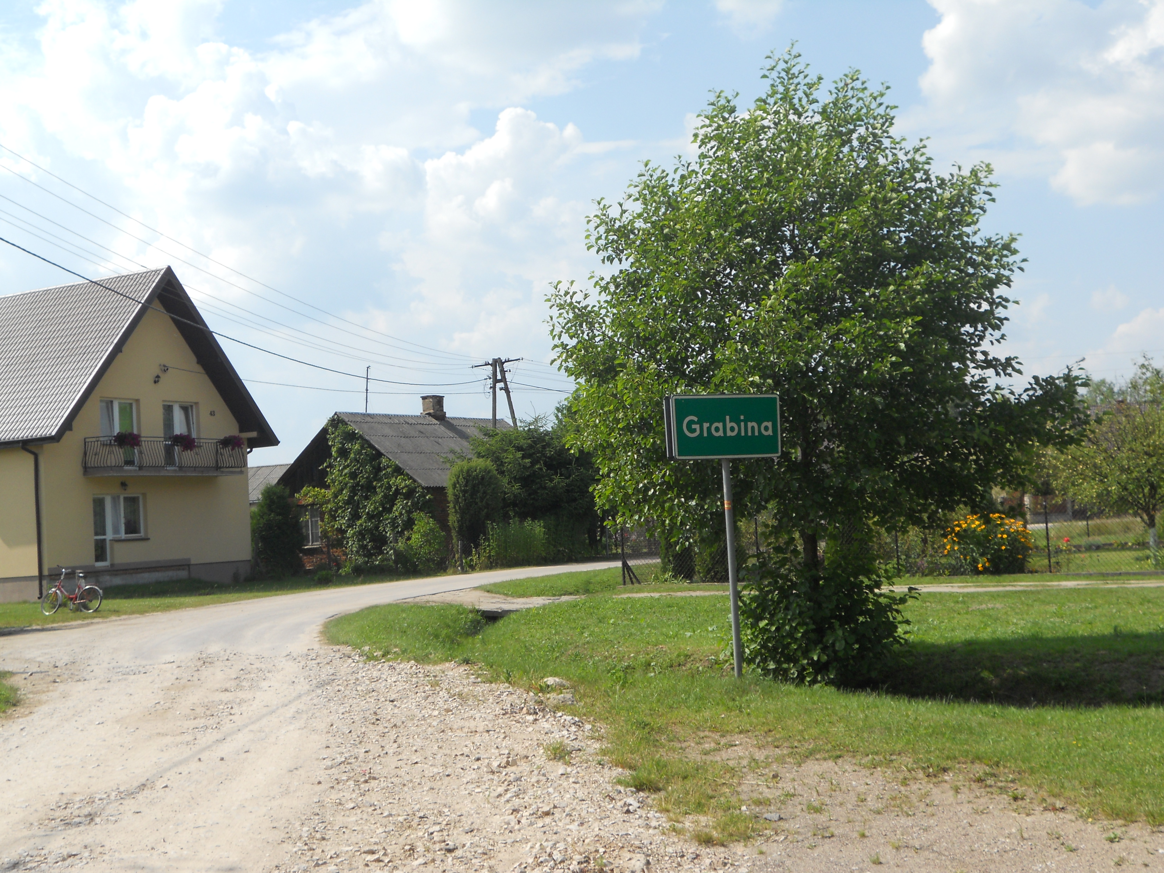 Grabina